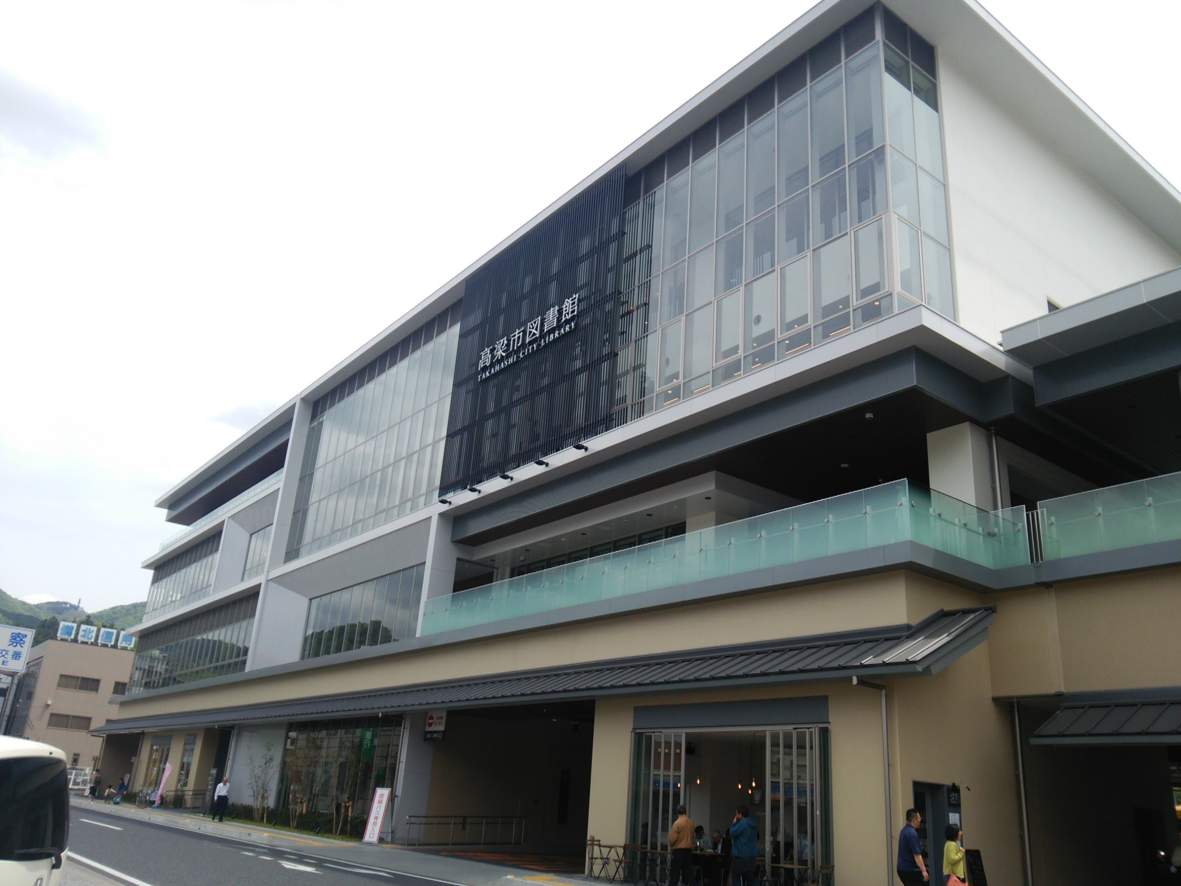 高梁市複合施設（高梁市図書館・蔦屋書店・高梁バスセンター・スターバックスコーヒー・高梁市観光案内所）